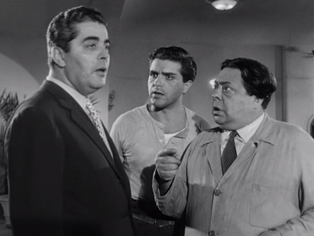 Screenshot dal film Cinque poveri in automobile (1952)